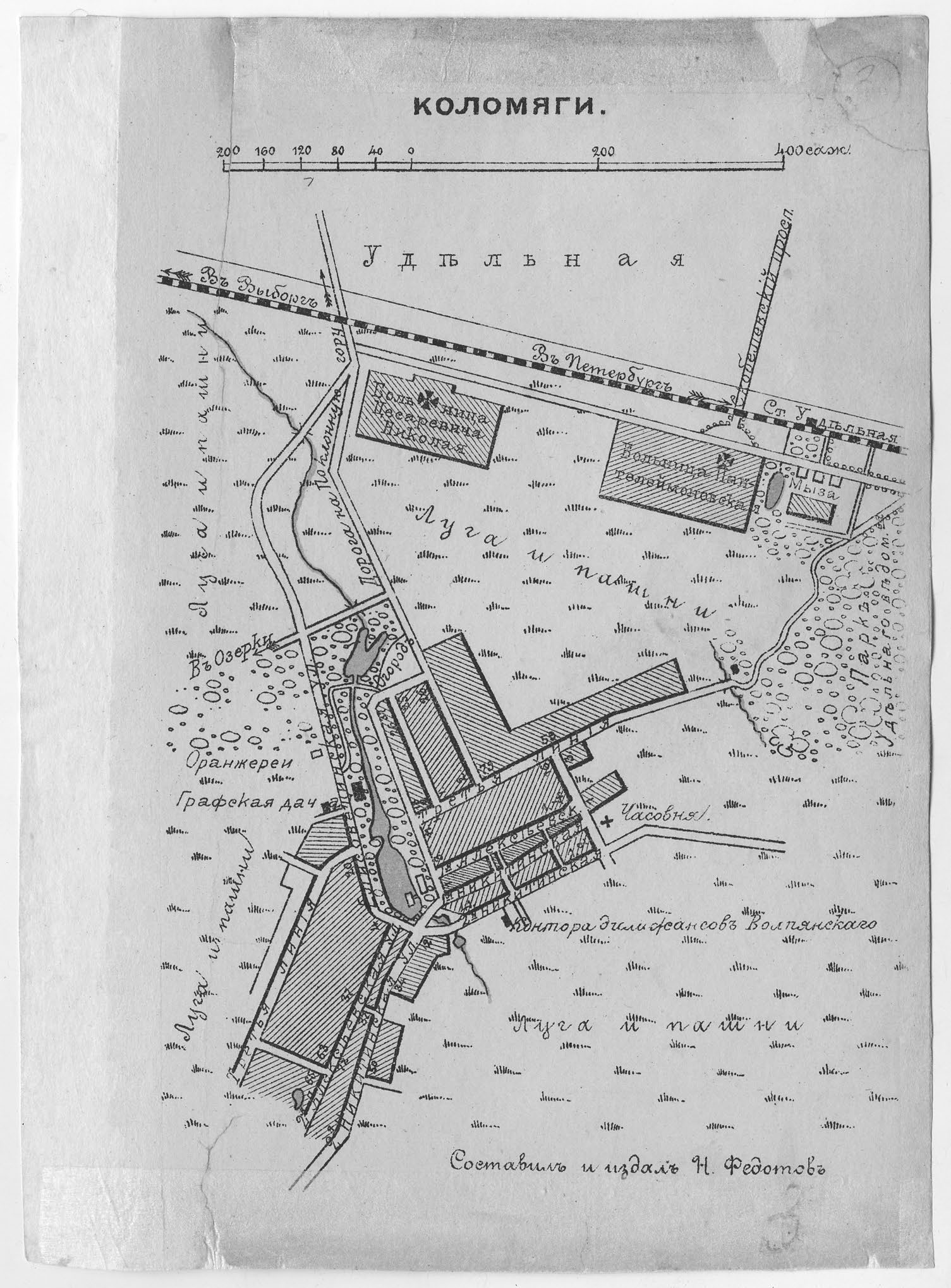 План селения Коломяги (примерно конец XIX века)